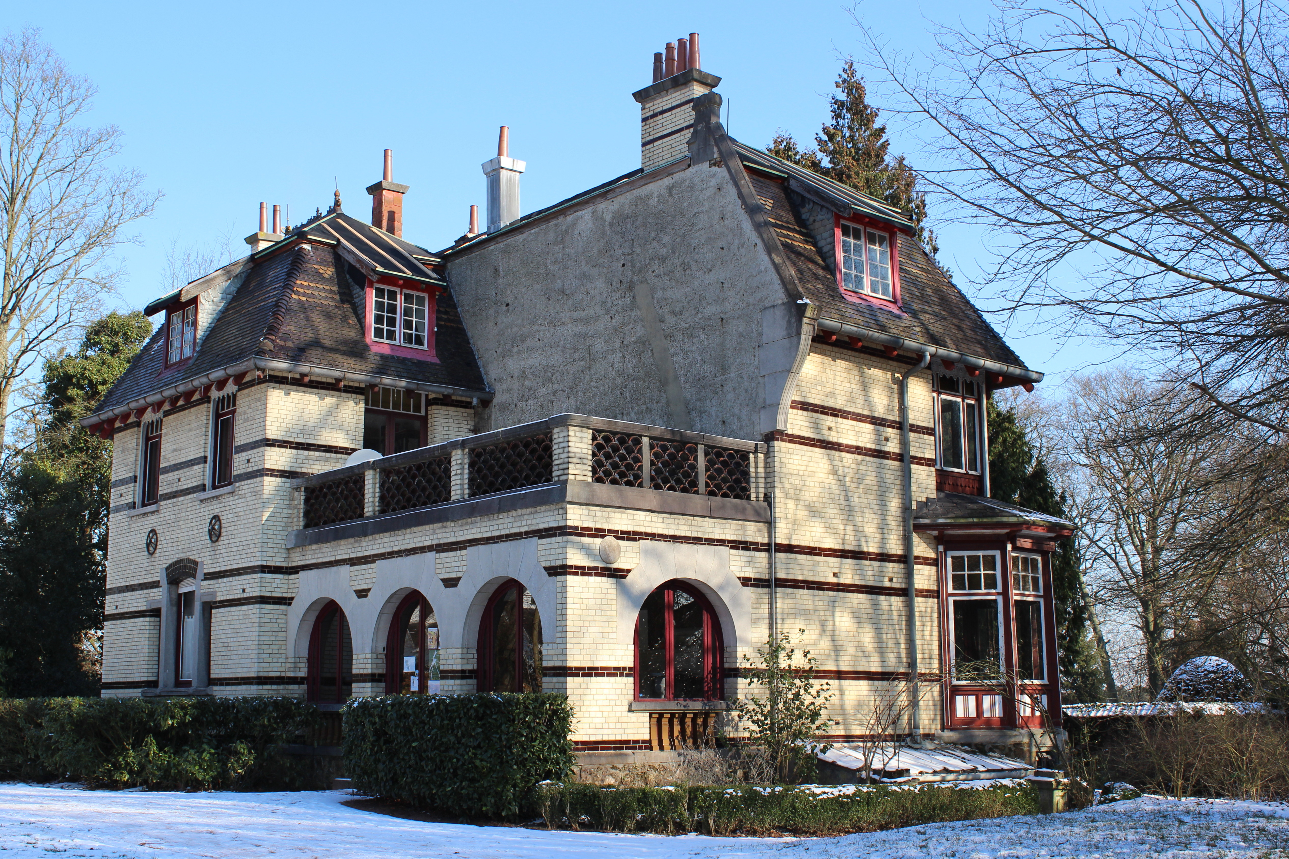 Parc Tournay-Solvay, Watermael-Boitsfort (Bruxelles), Belgique. La Villa Blanche, destinée à loger les amis de la famille Solvay, abrite actuellement laFondation européenne pour la sculpture